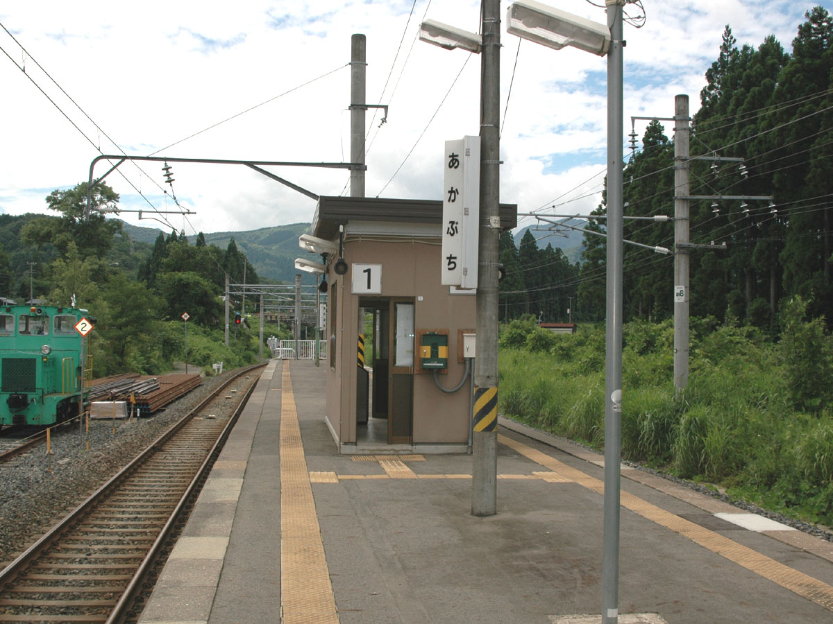 Akabuchi Station, Shizukuishi, Iwate, Japan